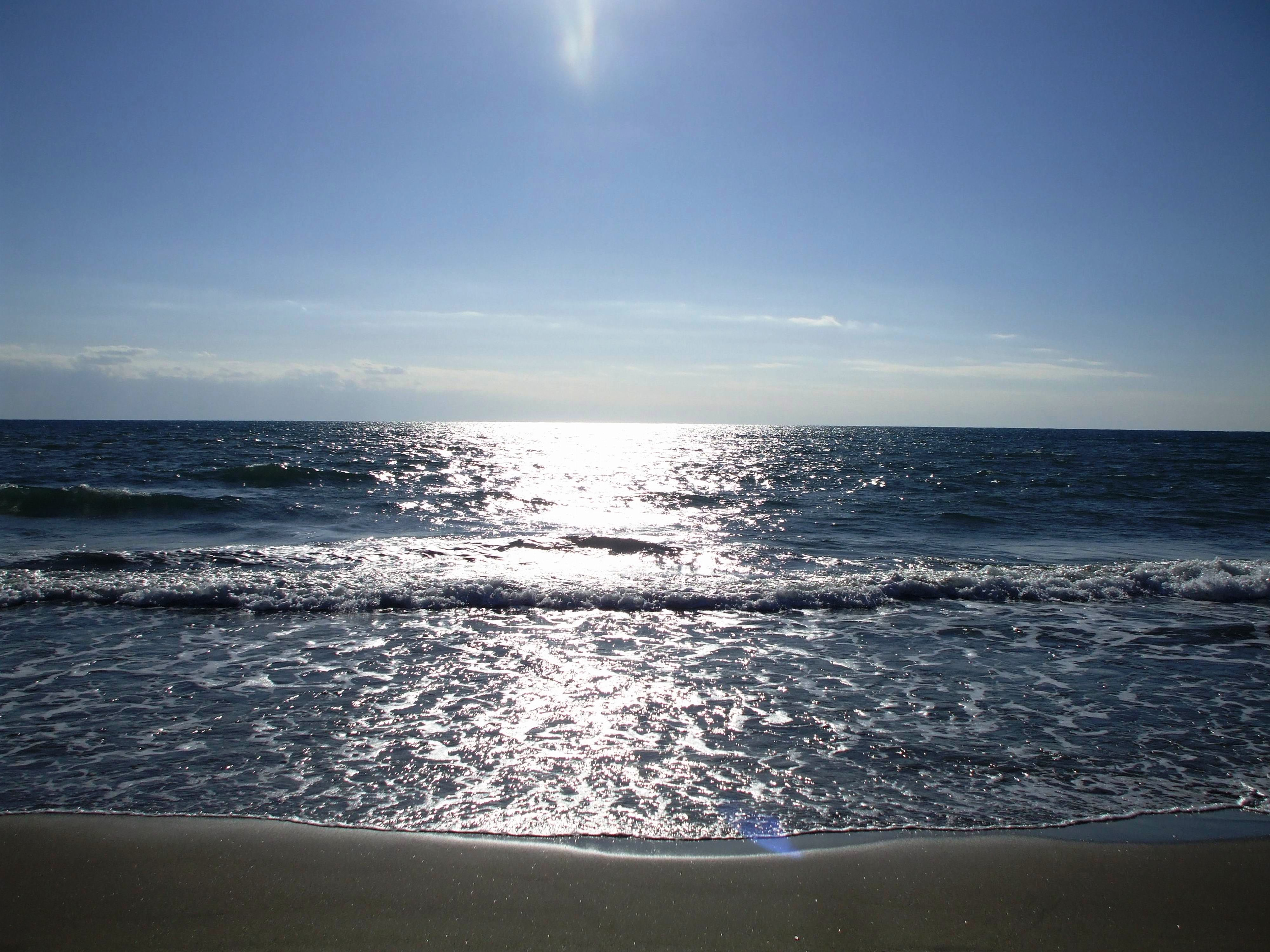 Mar Tirreno - Torvajanica (Pomezia-RM)